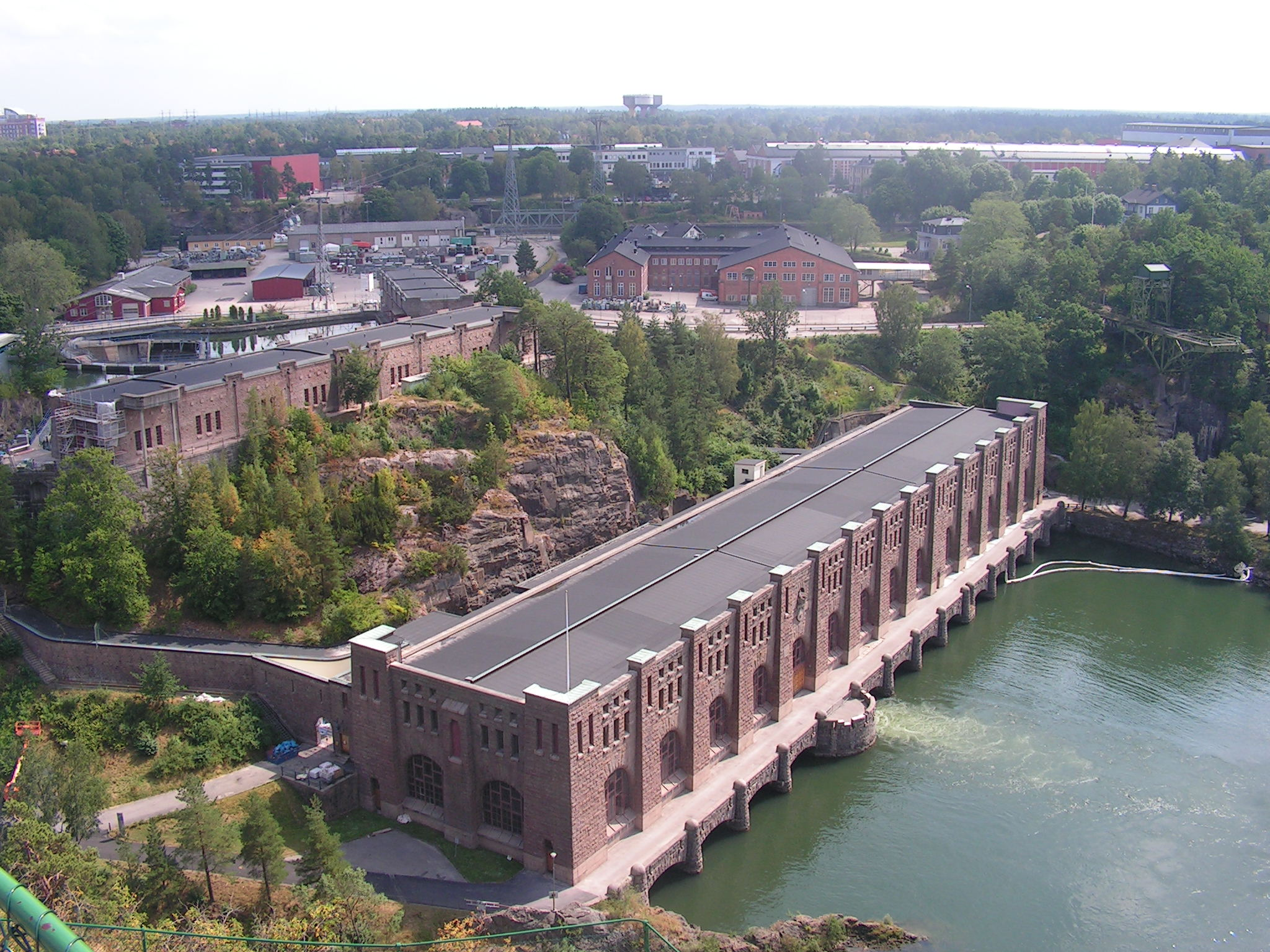 Olidan, Vy från Kopparklinten